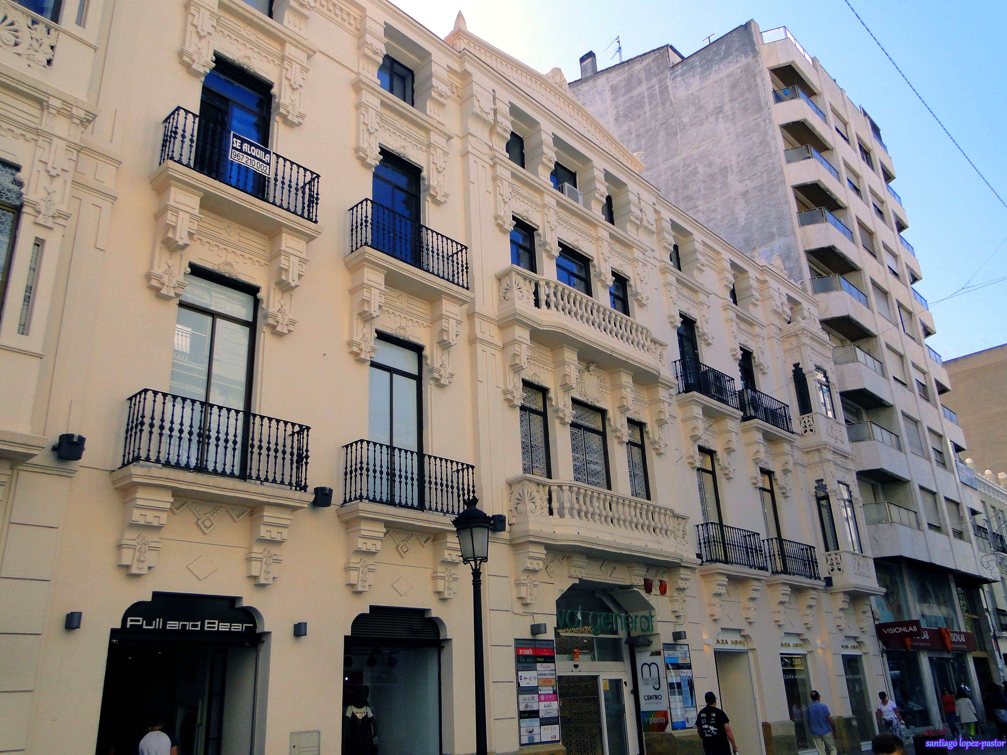 Edificio Val General. Albacete